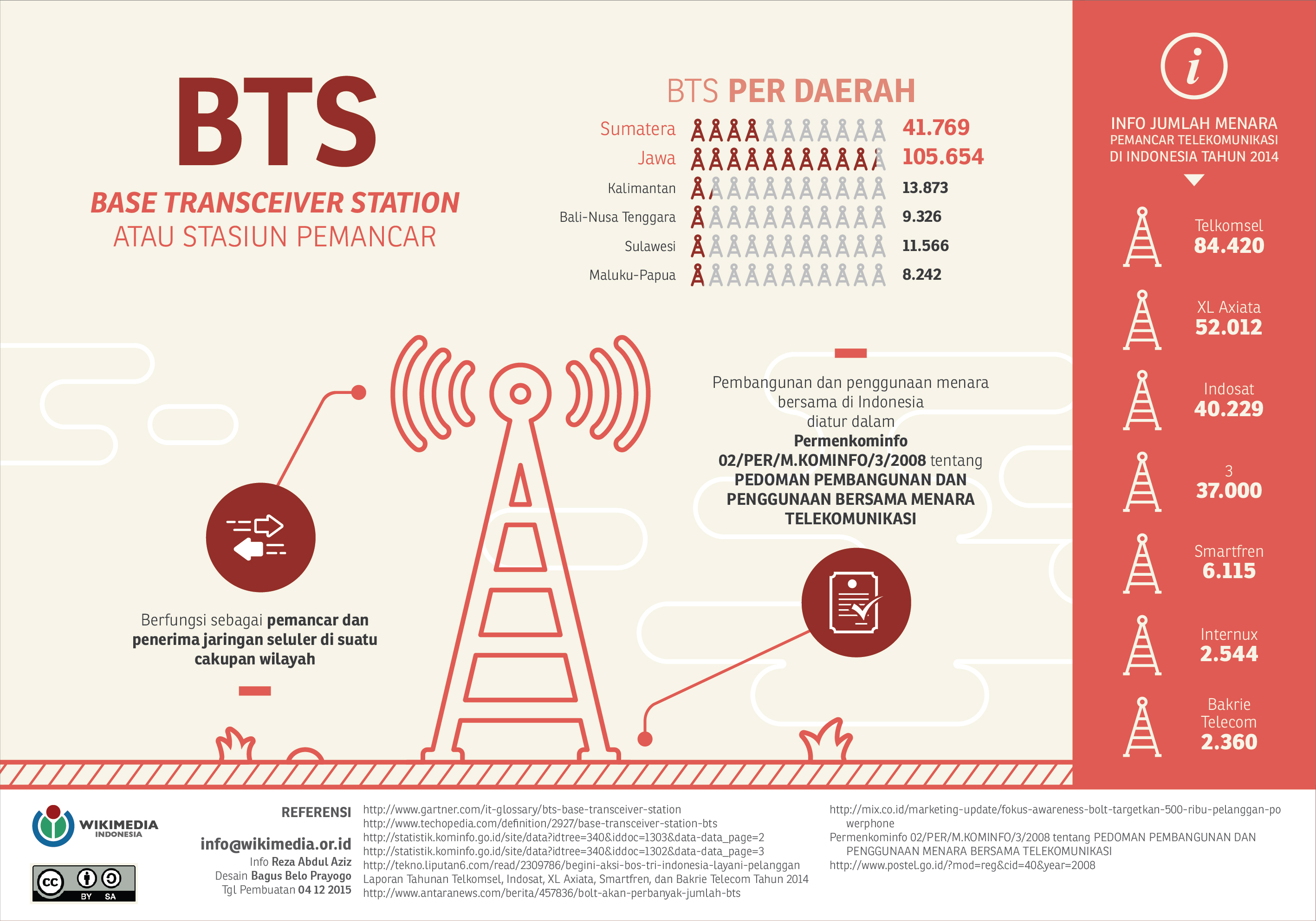 Infografis di atas berupaya untuk memberikan informasi kepada publik tentang salah satu komponen dalam sistem komunikasi di Indonesia yaitu stasiun pemancar atau Base Transceiver System.